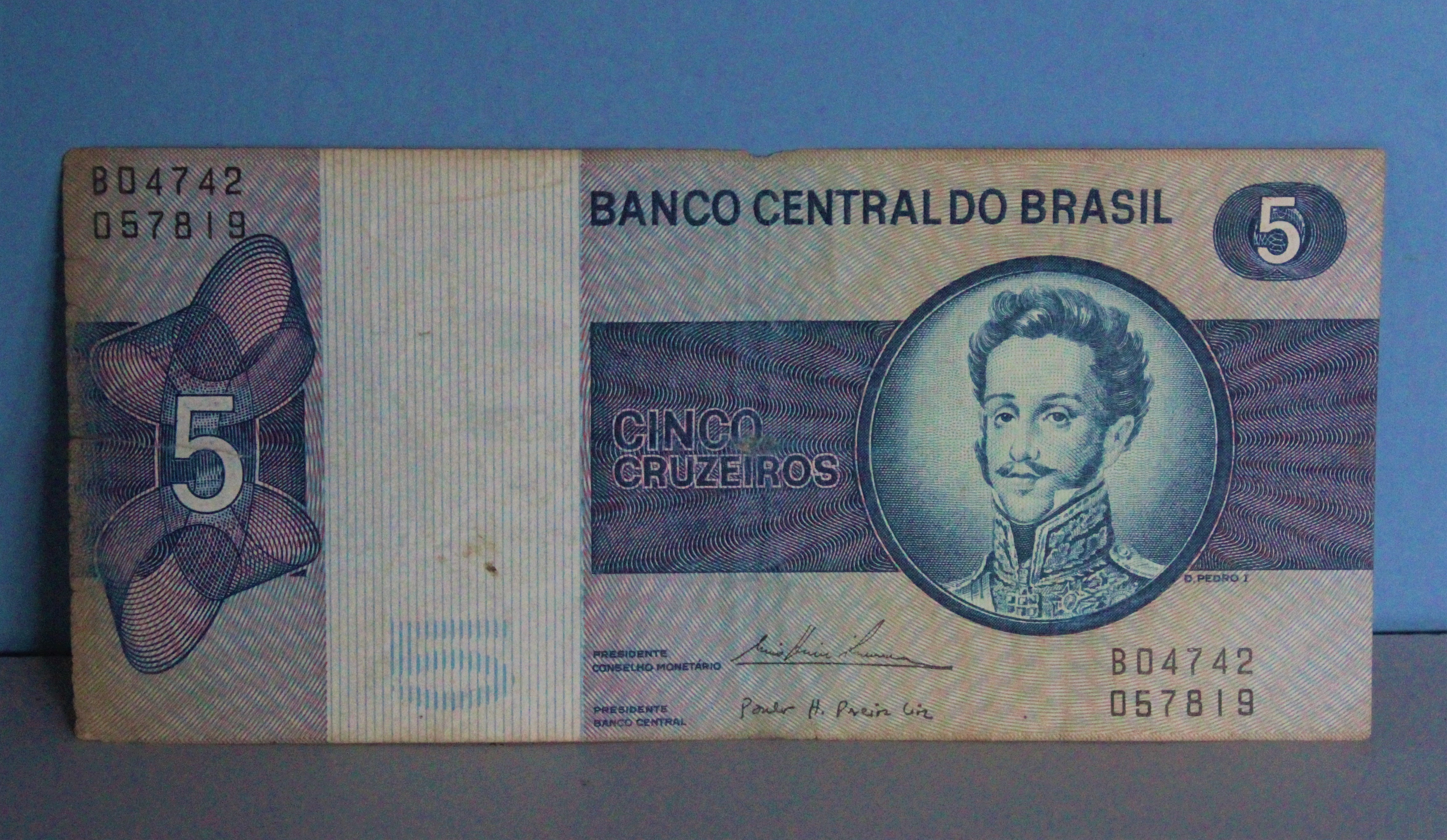 Dom Pedro I do Brasil na cédula de 5 Cruzeiro de 1966, do modelo desenhado por Aluísio Magalhães, que venceu o concurso do Banco Central do Brasil para a escolha do padrão Cruzeiro de 1967. O Concurso foi em 1966 e as cédulas vigoraram a partir de 1970